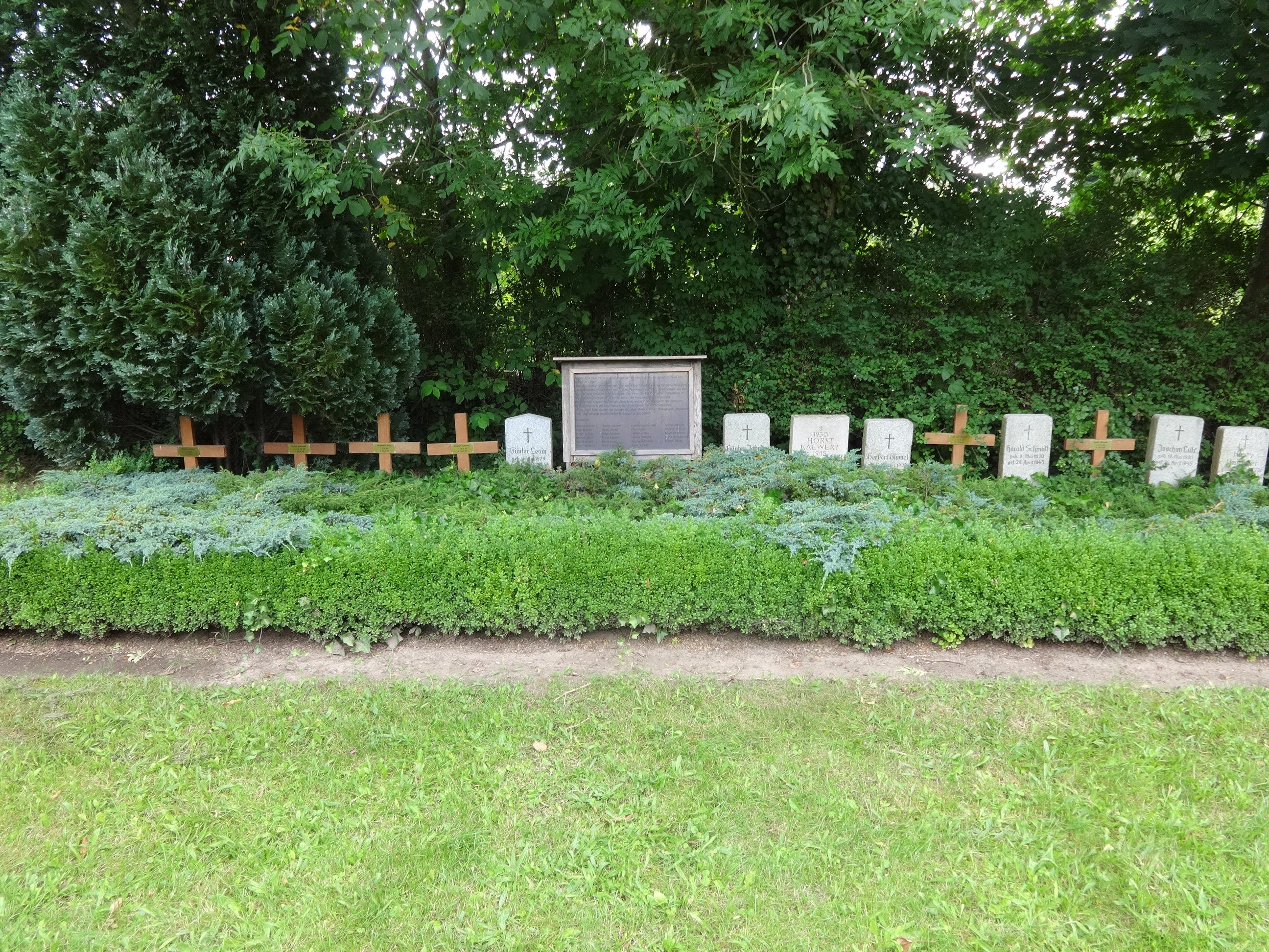 Die Backsteinkirche in Kirchdorf entstand im 14. Jahrhundert und wurde im 17. Jahrhundert um ein Kirchenschiff erweitert. Im 19. Jahrhundert erfolgte ein neugotischer Umbau.